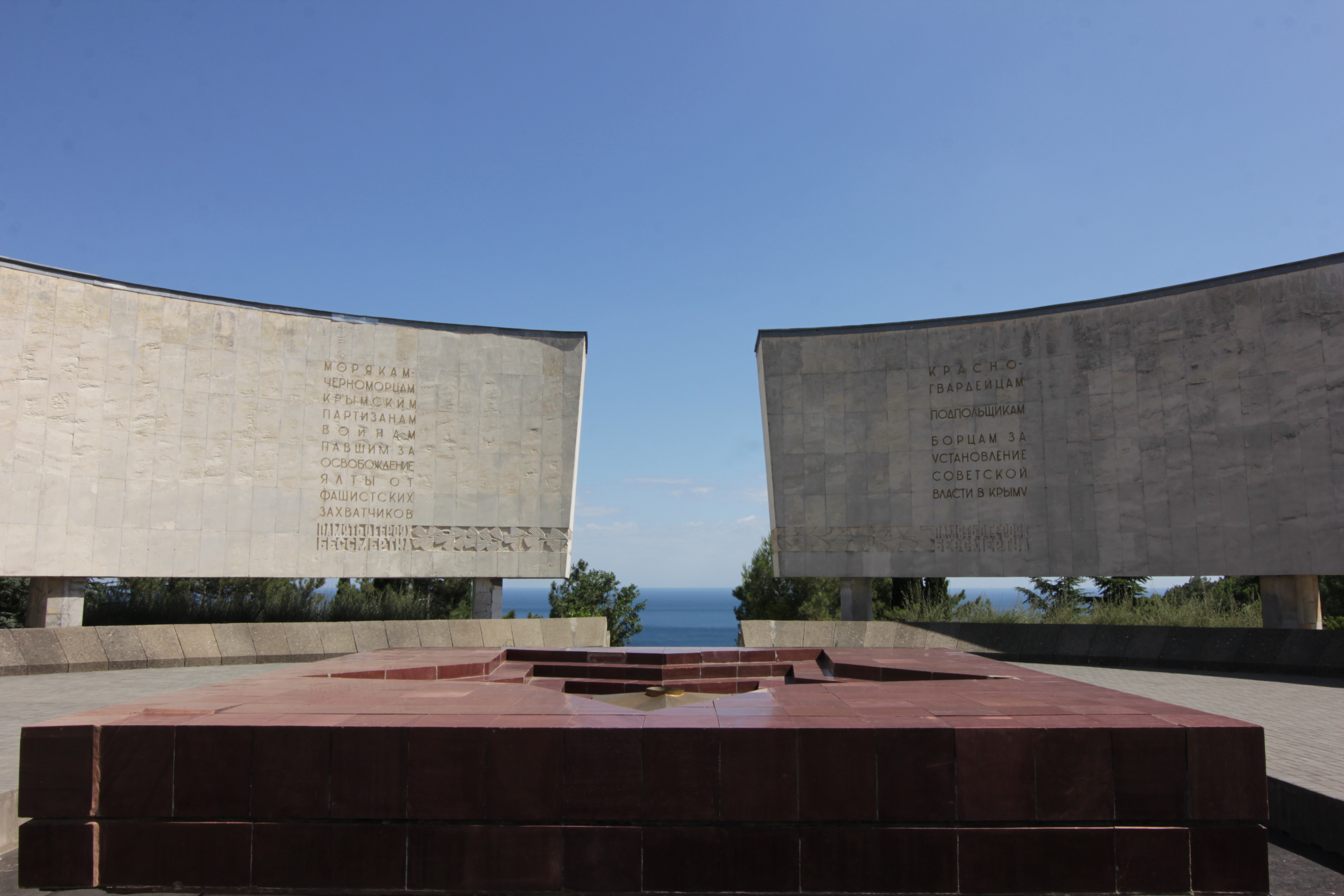 Мемориальный комплекс в честь героев гражданской и Великой Отечественной войн. Дата событий: 1917-1920 гг., 1941-1945 гг. Дата сооружения: 1967 г., 1973 г.: северо-западная часть города, у подножия холма Малый Дарсан (холм Славы), Ялта, Крым This object is located on the Crimean Peninsula and recognized as cultural heritage by Russia under the monument ID: 8231672000. The legal status of the Crimean region is currently disputed.